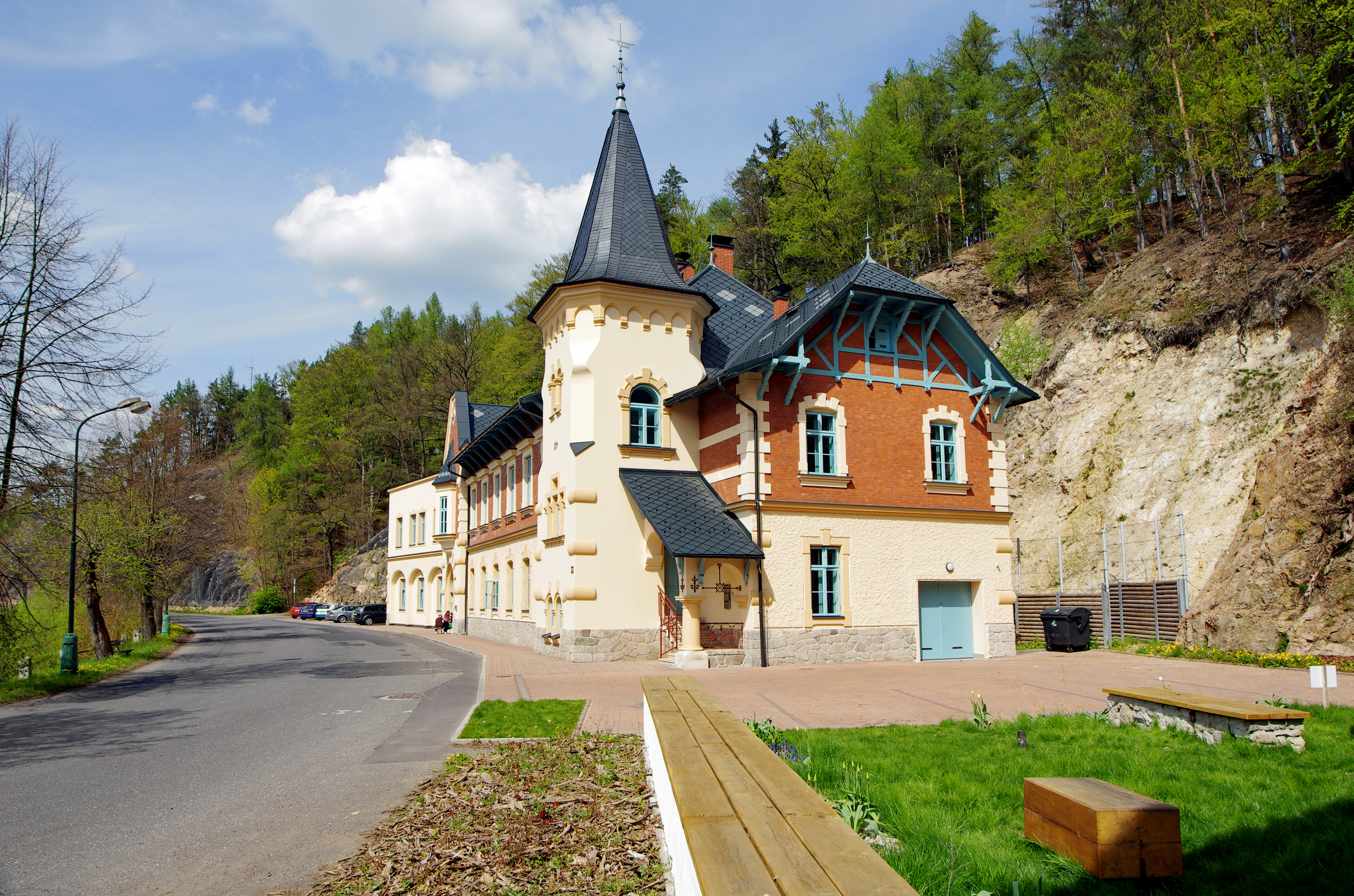 Kyselka - dům Stallburg ve stylu francouzské pseudogotiky - nechal vystavět v letech 1893-1894 Heinrich Mattoni pro zaměstnance společnosti, okres Karlovy Vary